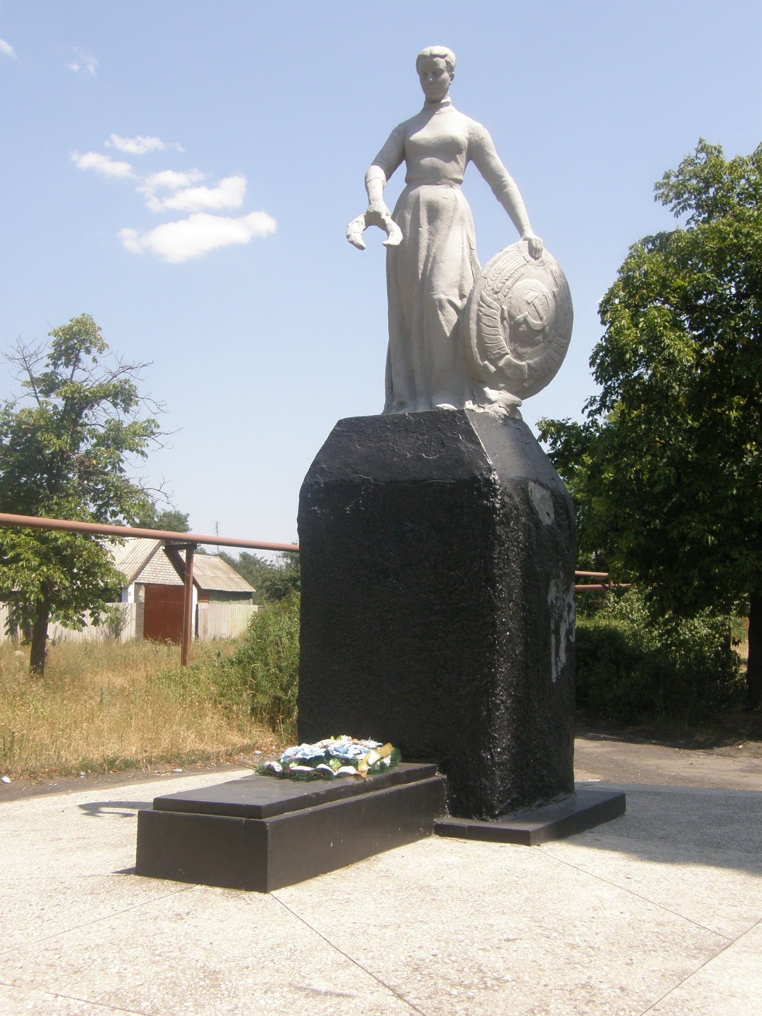 Снежное